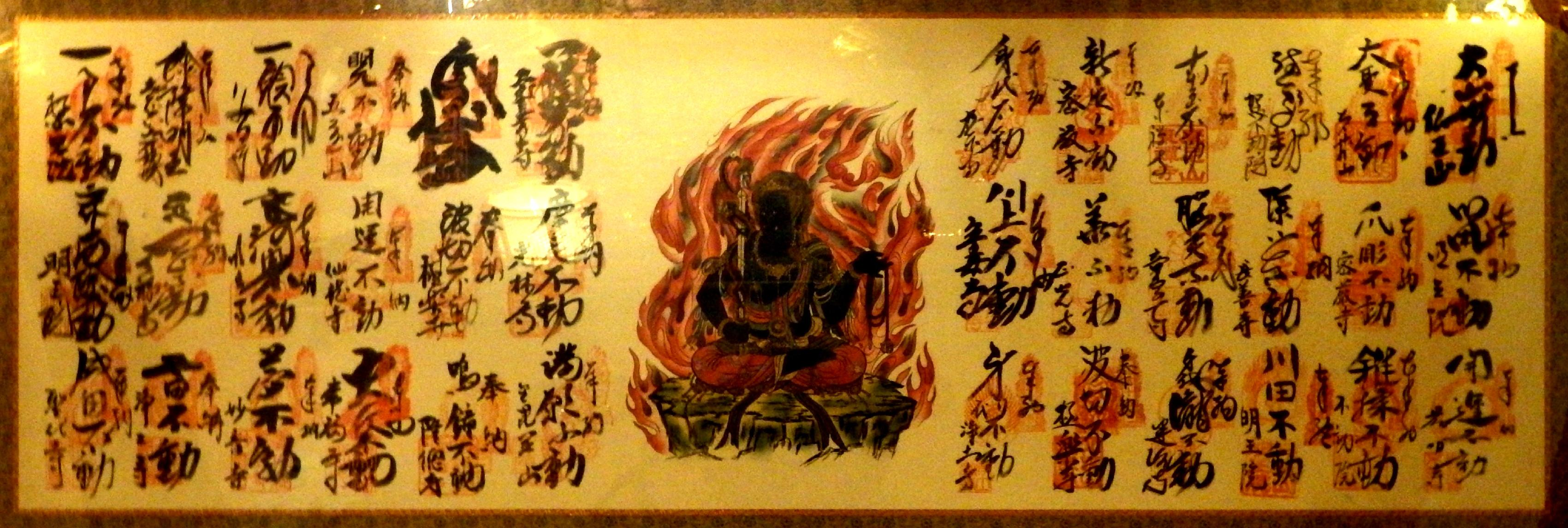 四国三十六不動霊場の掛け軸